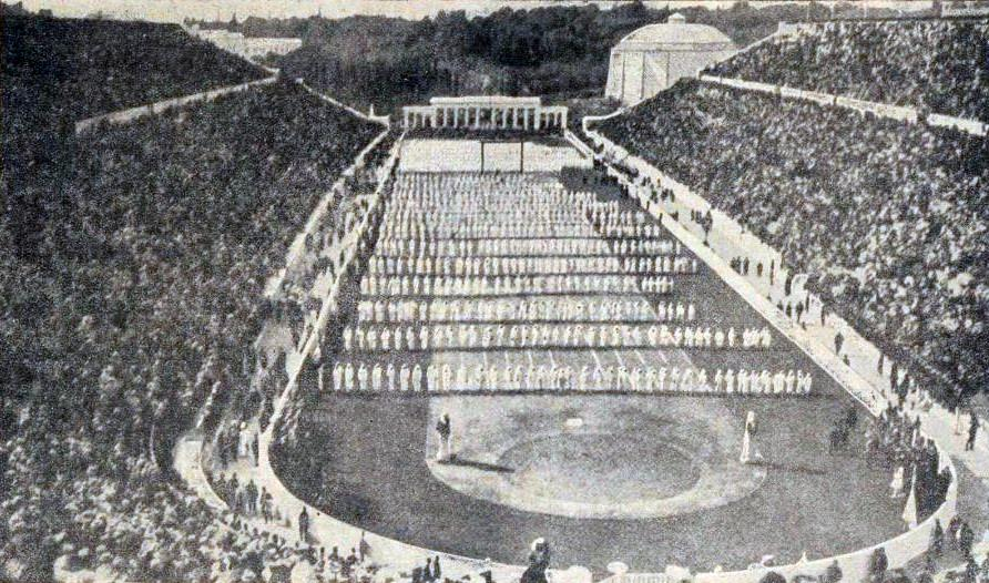 Ouverture des premiers jeux olympiques à Athènes, en 1896.